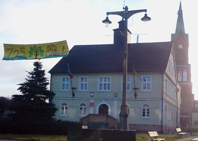 Resko, Rynek 1 - Urząd Gminy